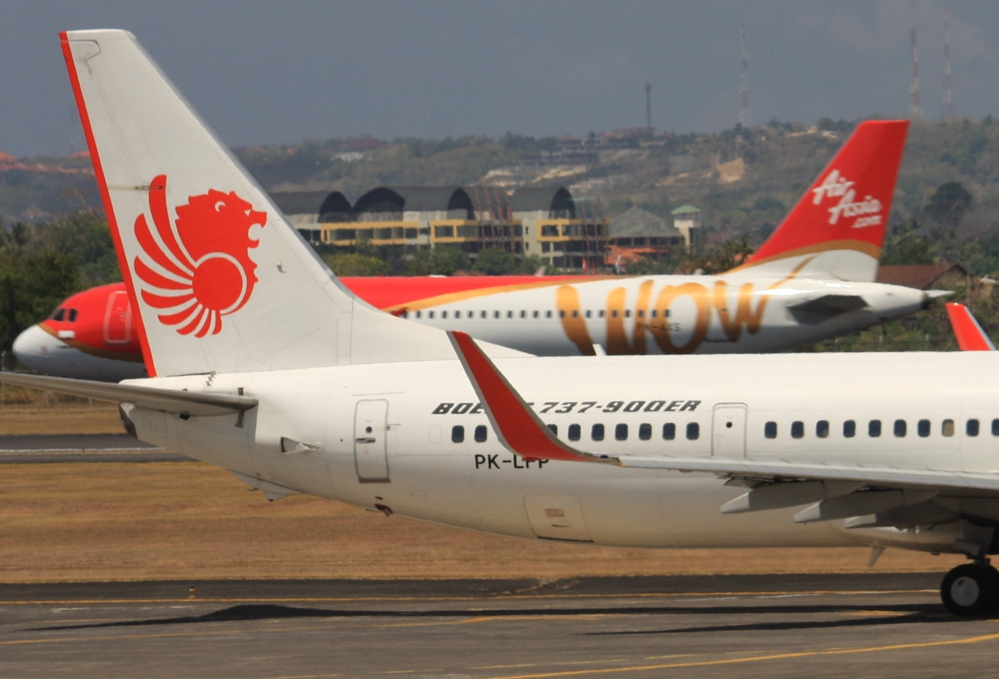 also visible: PK-AXS Airbus A320-216 (cn 2885) Indonesia AirAsia. Denpasar / Bali - Ngurah Rai International (DPS / WADD) Indonesia, August 24, 2012.